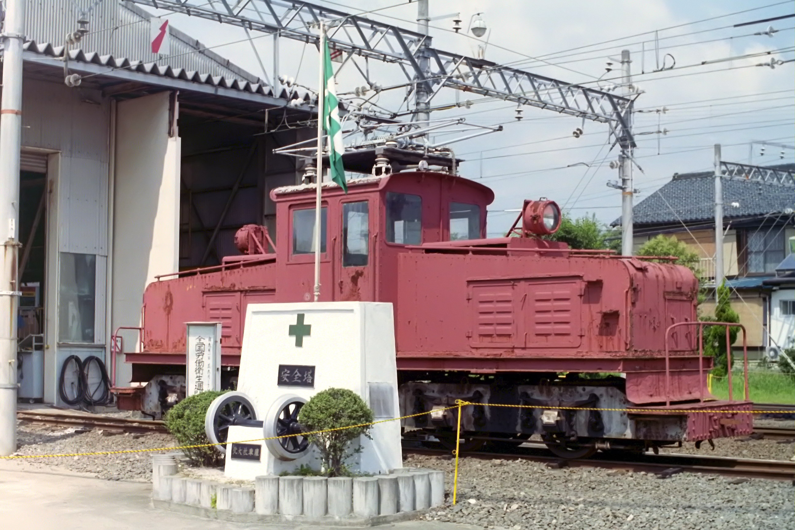 近畿日本鉄道 デ45（車籍抹消後） 1992年9月